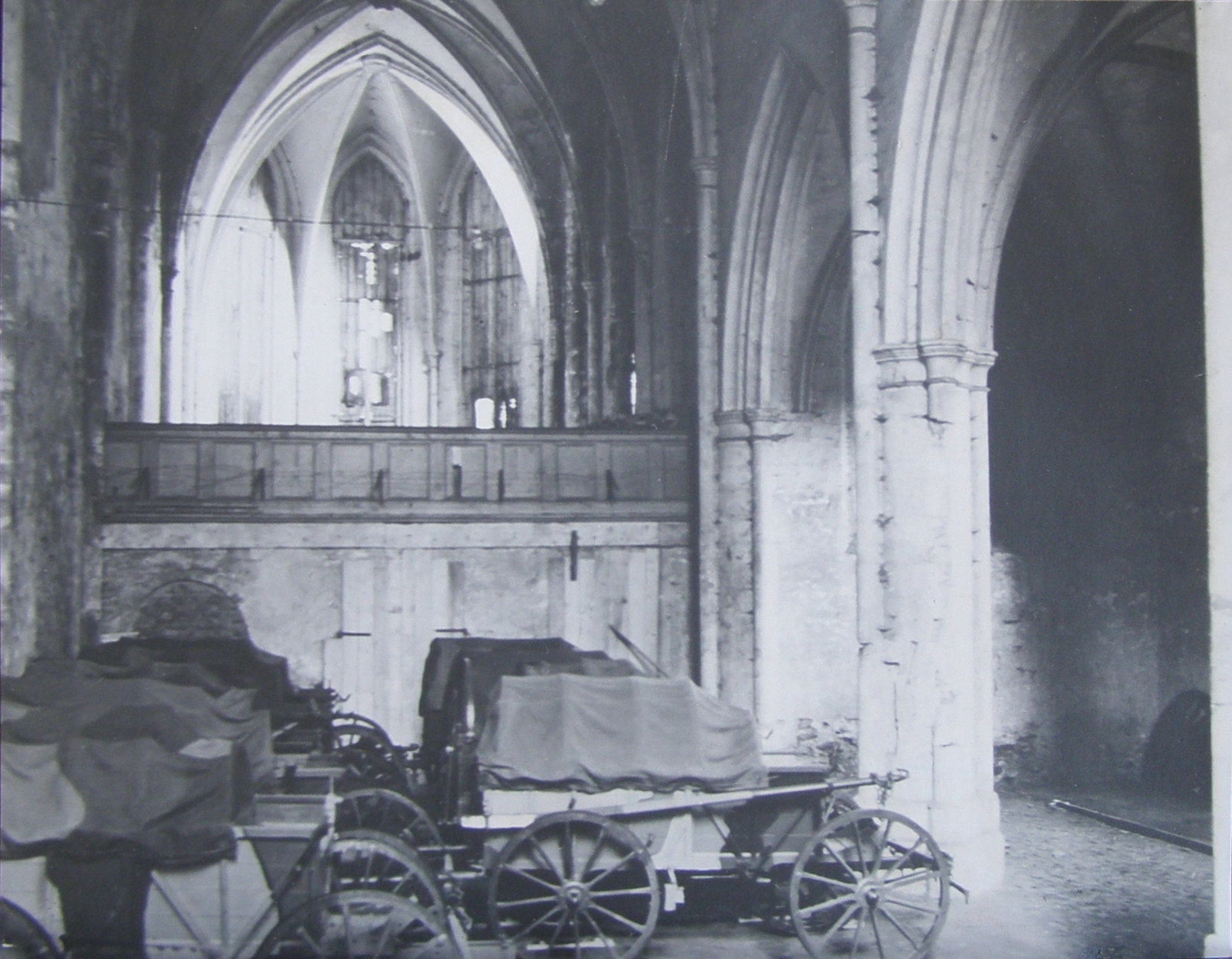 Foto der Marienkirche Höxter aus dem 19. Jahrhundert